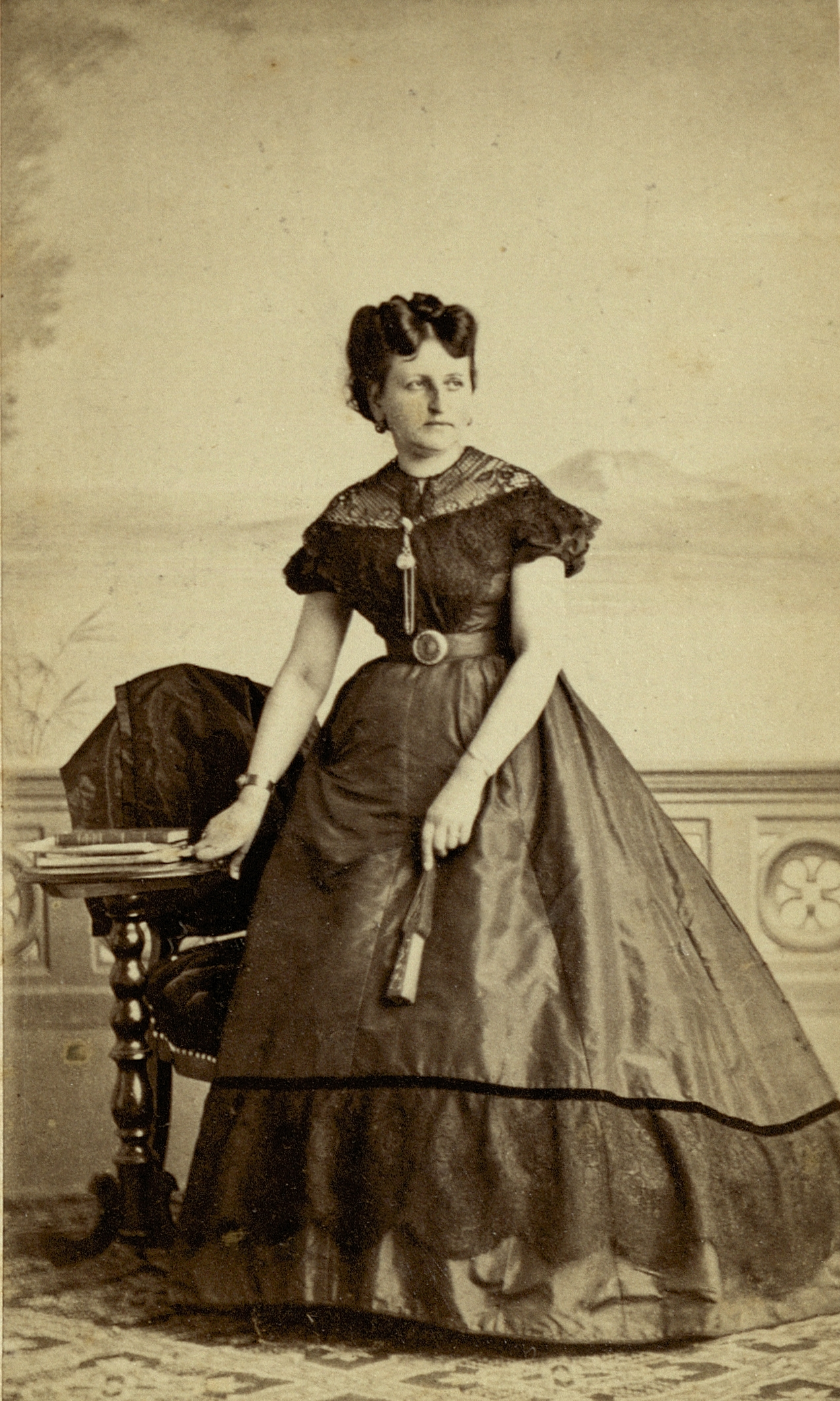 Luiza Pesjak (1828–1898), Slovene writer.